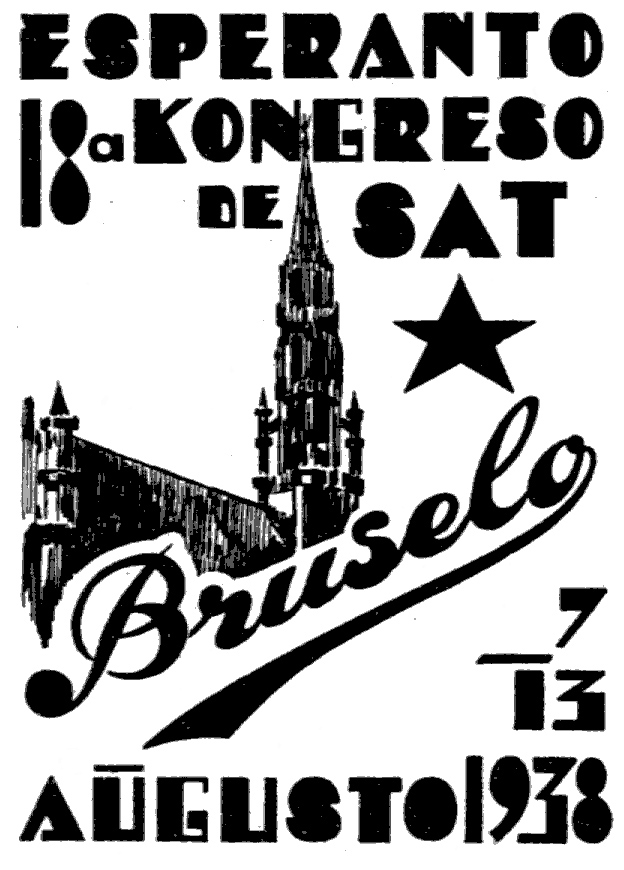 Afiŝo de la 18-a SAT-kongreso en Bruselo, 1938